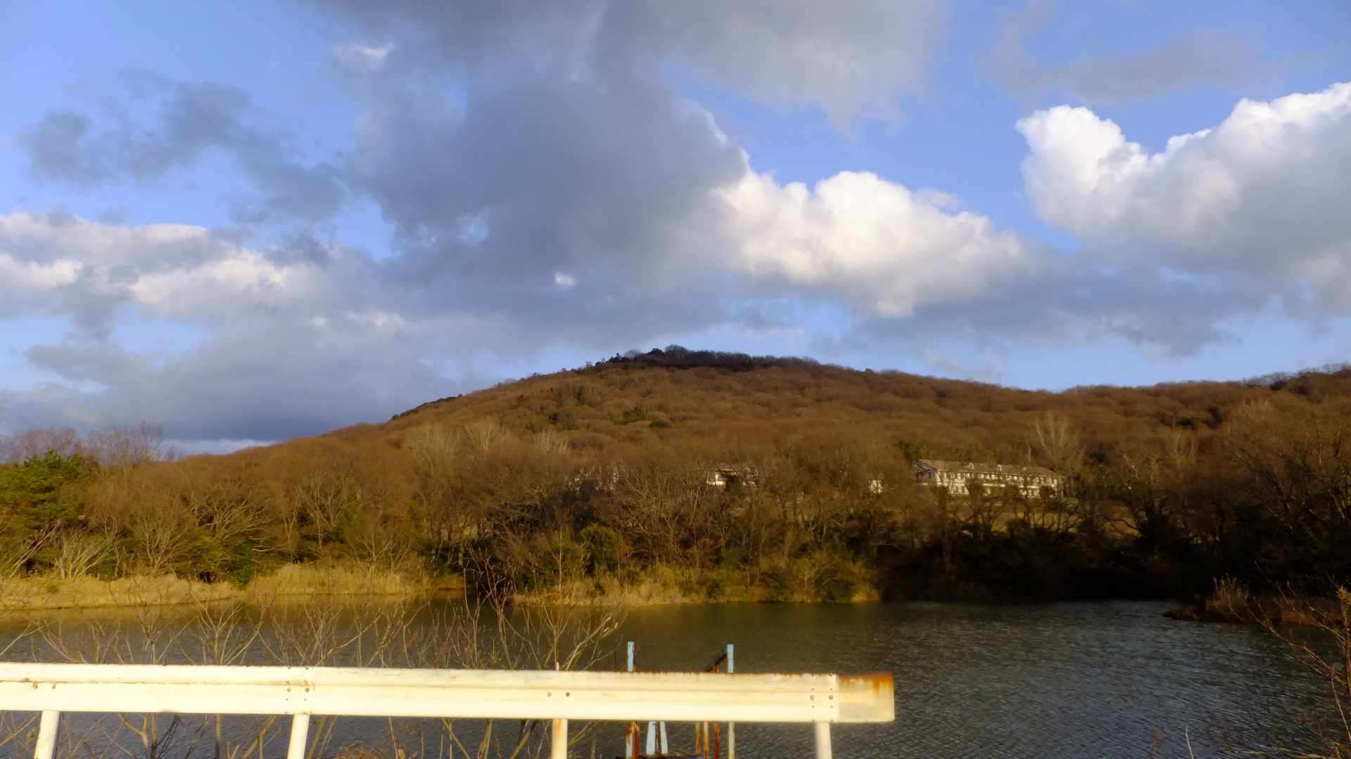 兵庫県神戸市西区神出町小束野